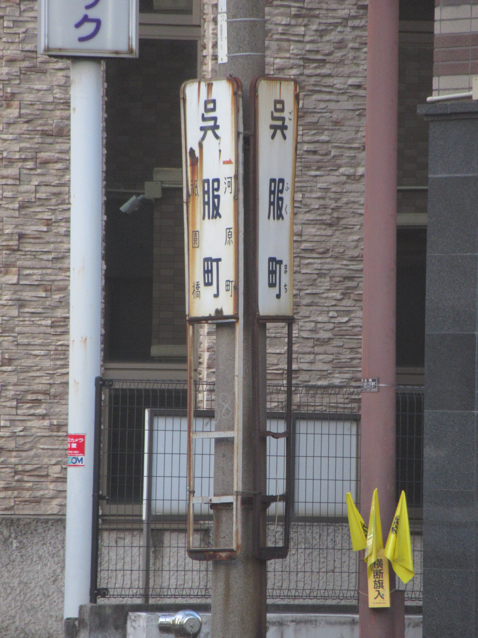 呉服町停留場のホーロー製駅名標（2019年10月）